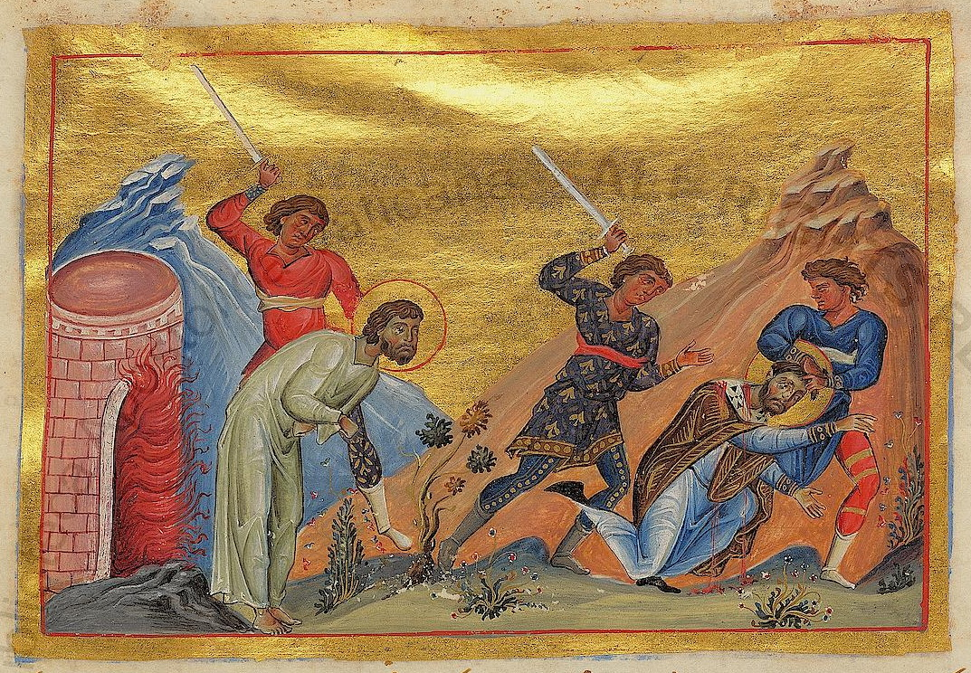 Сщмч. Елевферий, еп. Иллирийский. Миниатюра из Минология Василия II. 976-1025 гг. (Vat. gr. 1613. P.246) // Eleuterus of Illyria